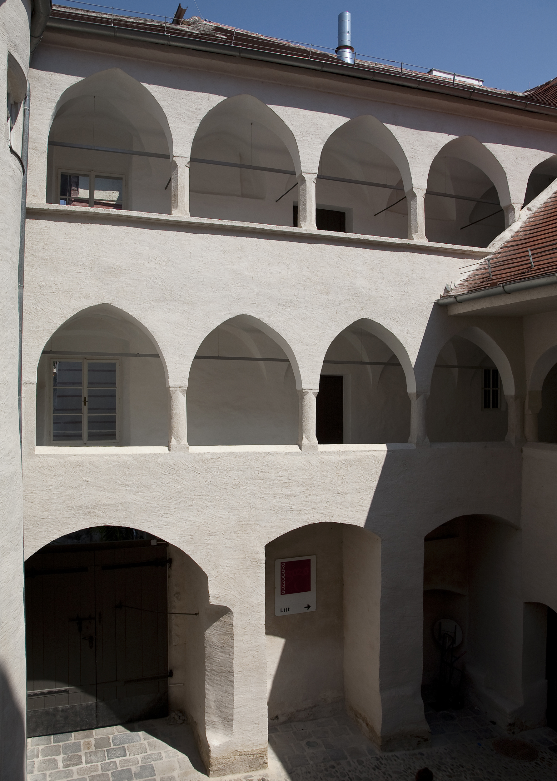 Gozzoburg, Hoher Markt 11, Krems an der Donau, Innenhof